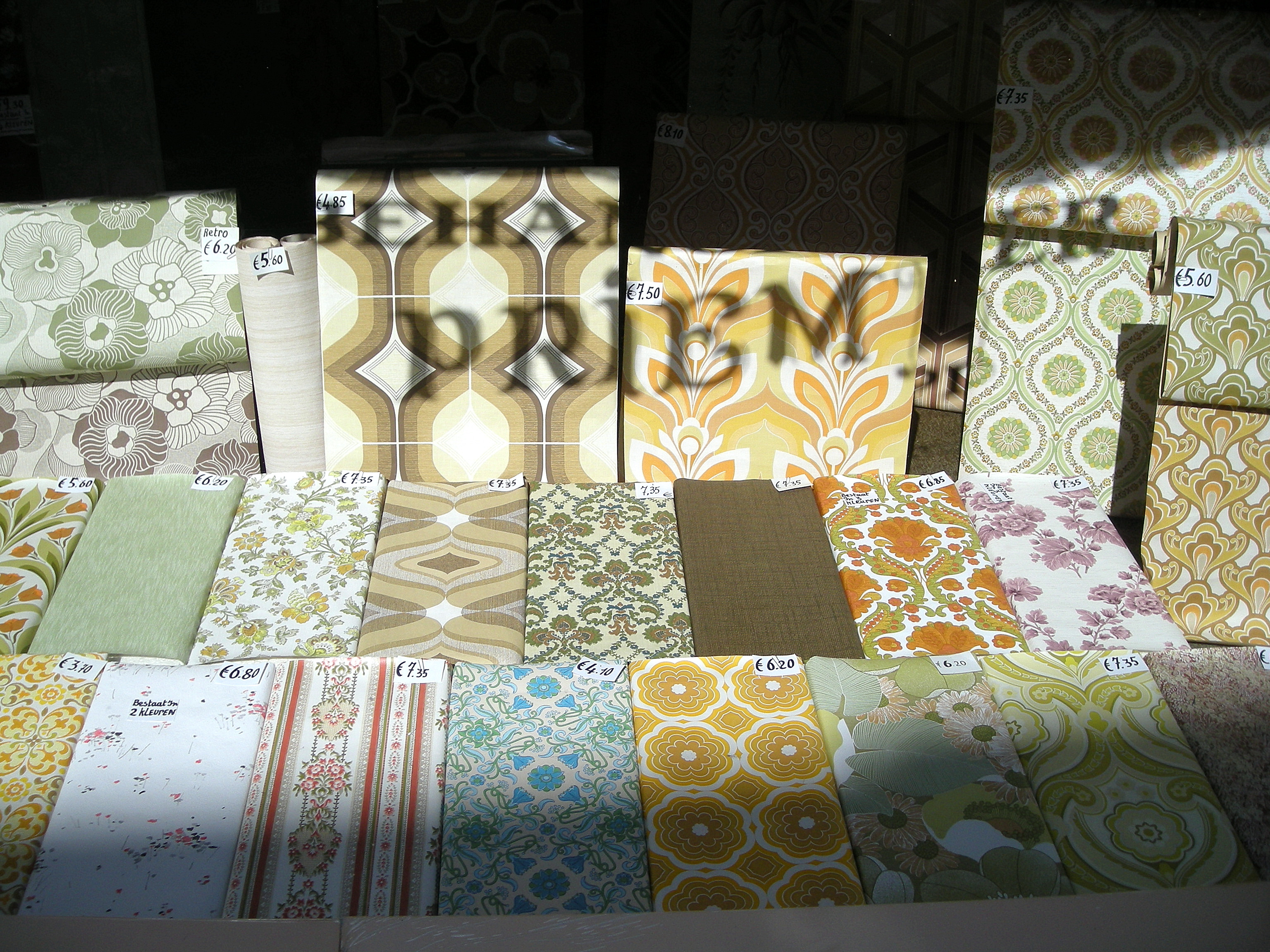 Behangpapier Priem Oudburg